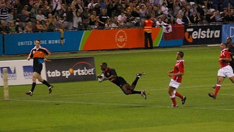 Uganda vs. Tonga try. EDITED. FRAGMENT